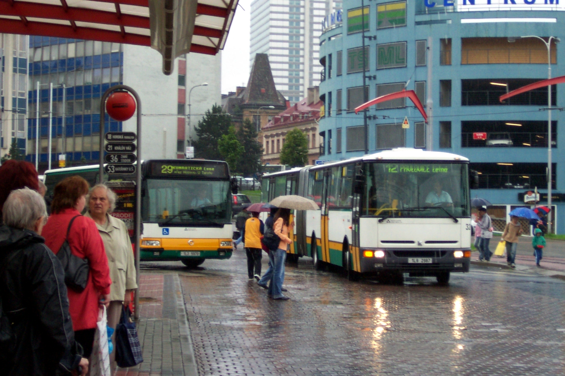 Městské liberecké autobusy